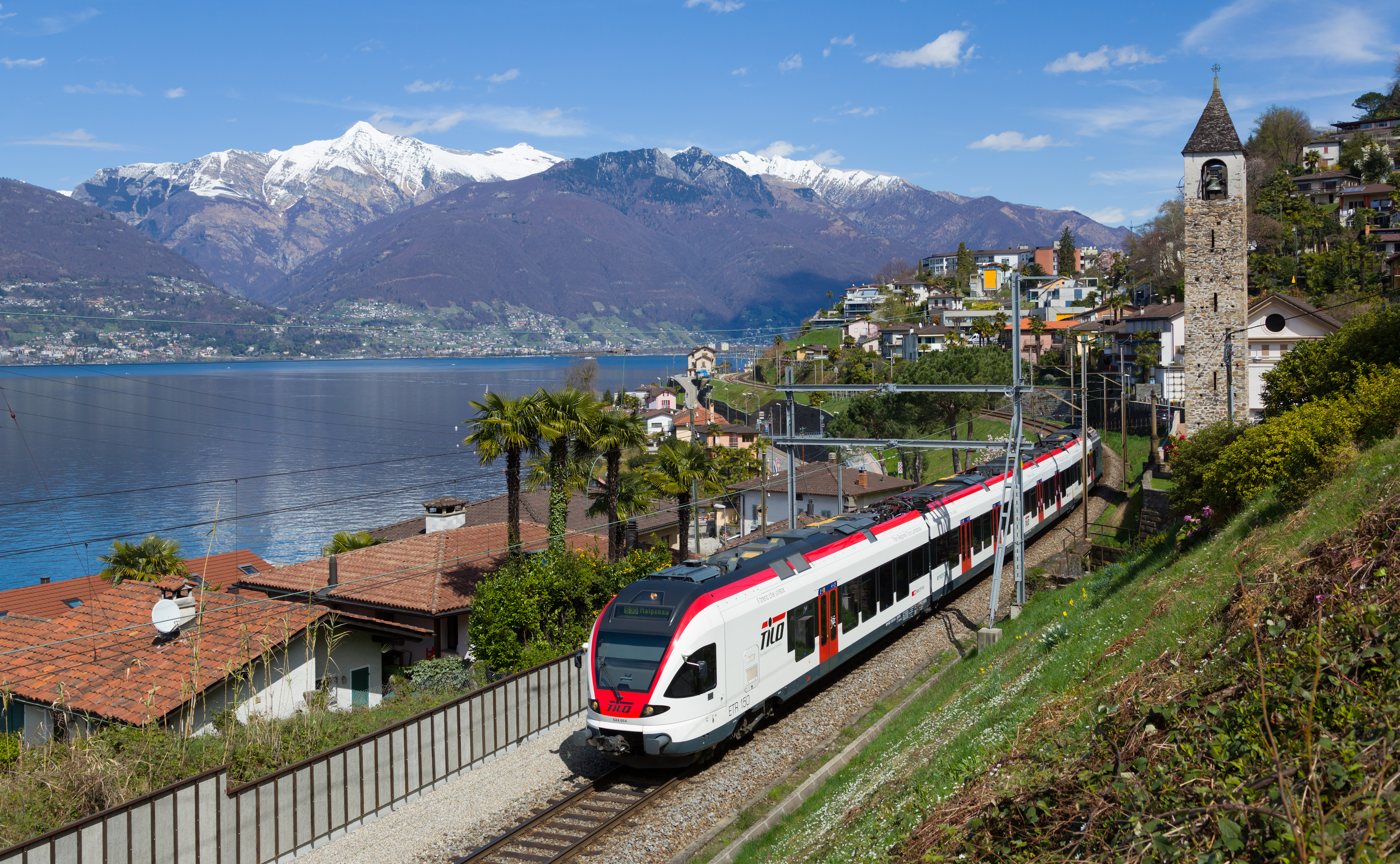 Elettrotreno RABe 524 delle Ferrovie Federali Svizzere in corsa sulla linea ticinese S30, presso San Nazzaro.